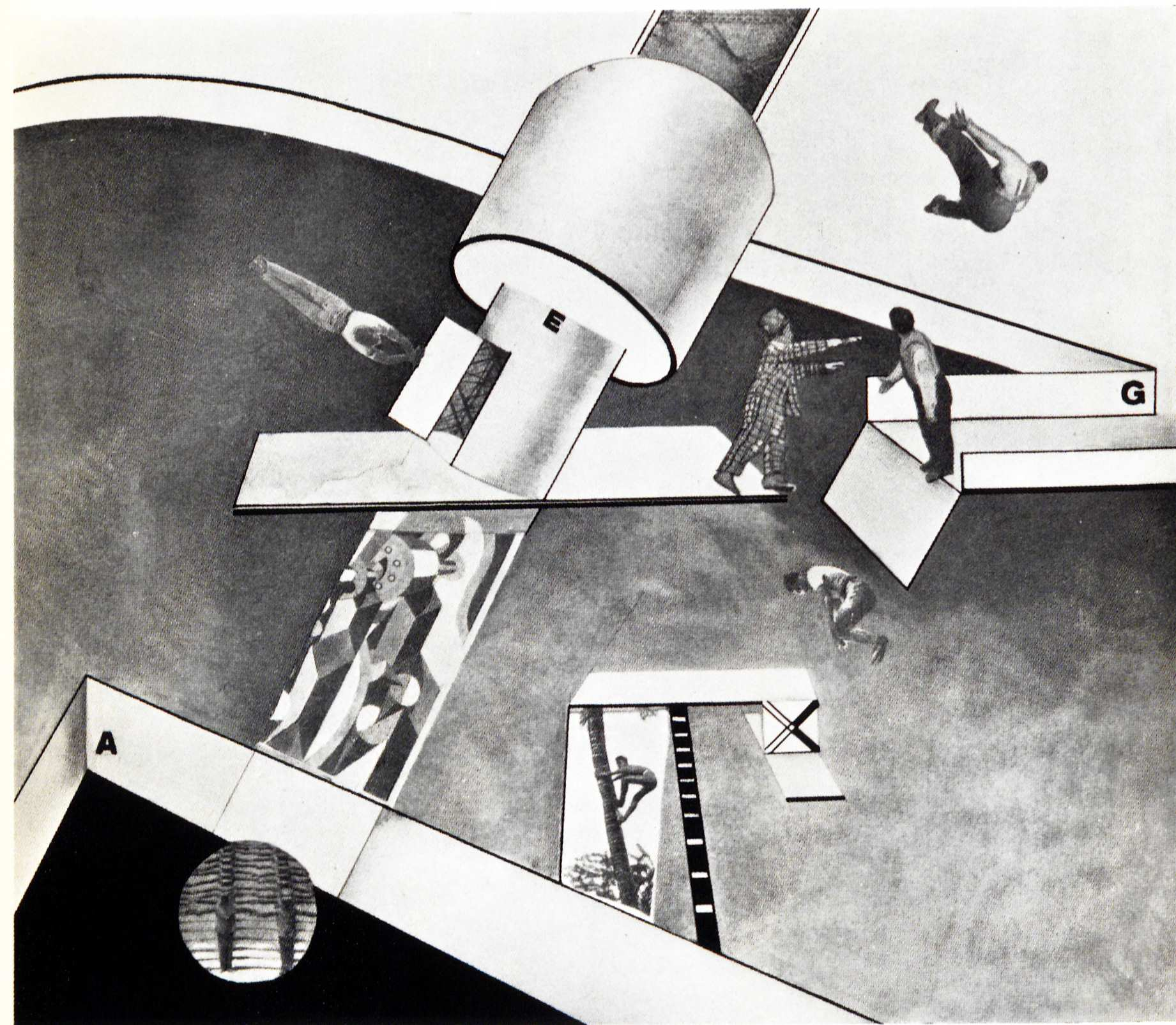 Farkas Molnár Das U-Theater im Betrieb